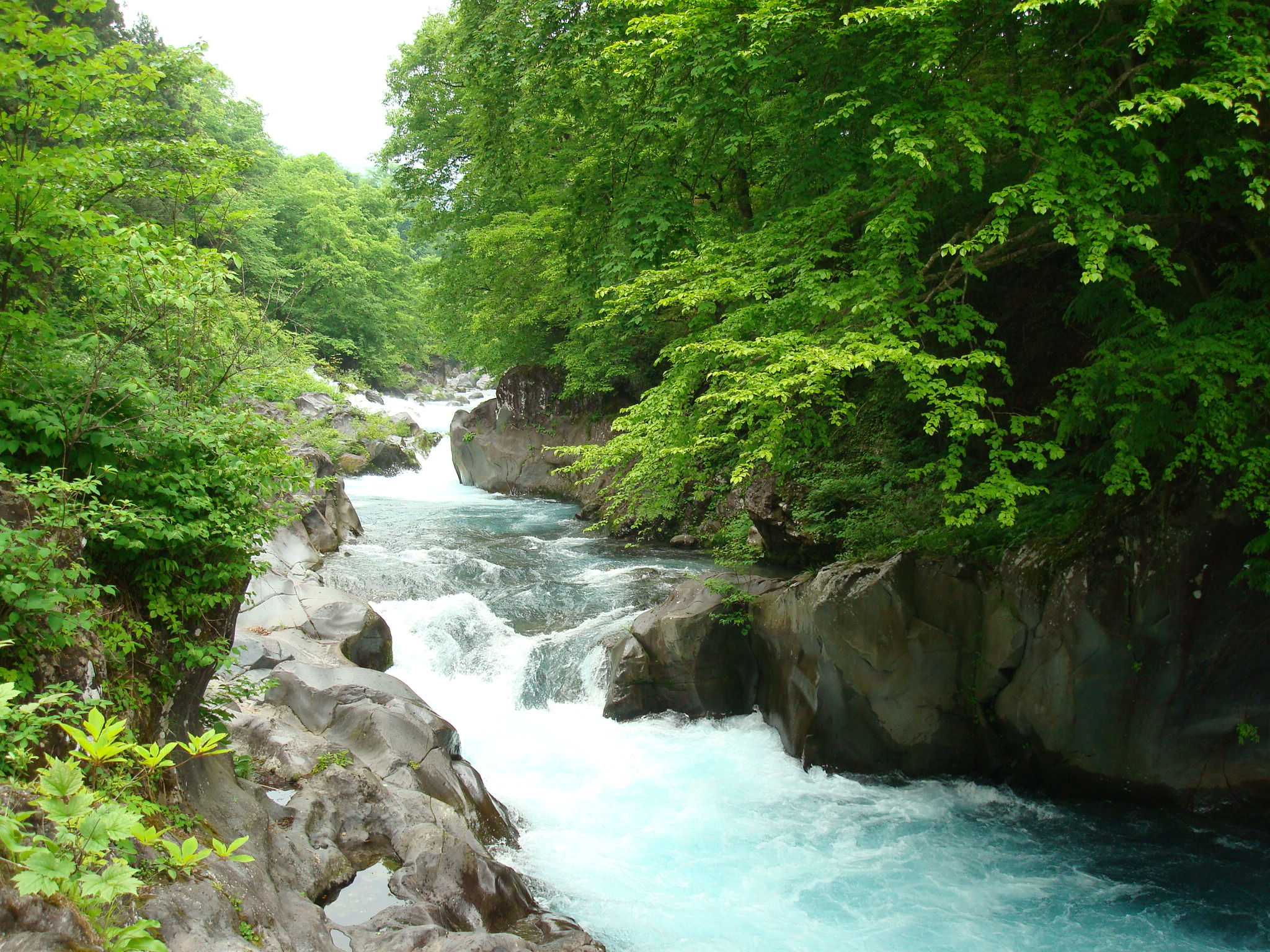 コバルトブルーの憾満ヶ淵